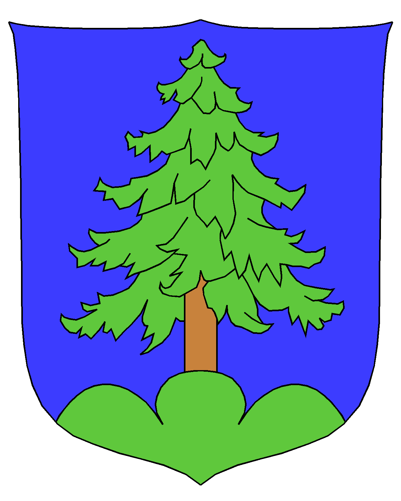 Das Gemeindewappen von Bellwald